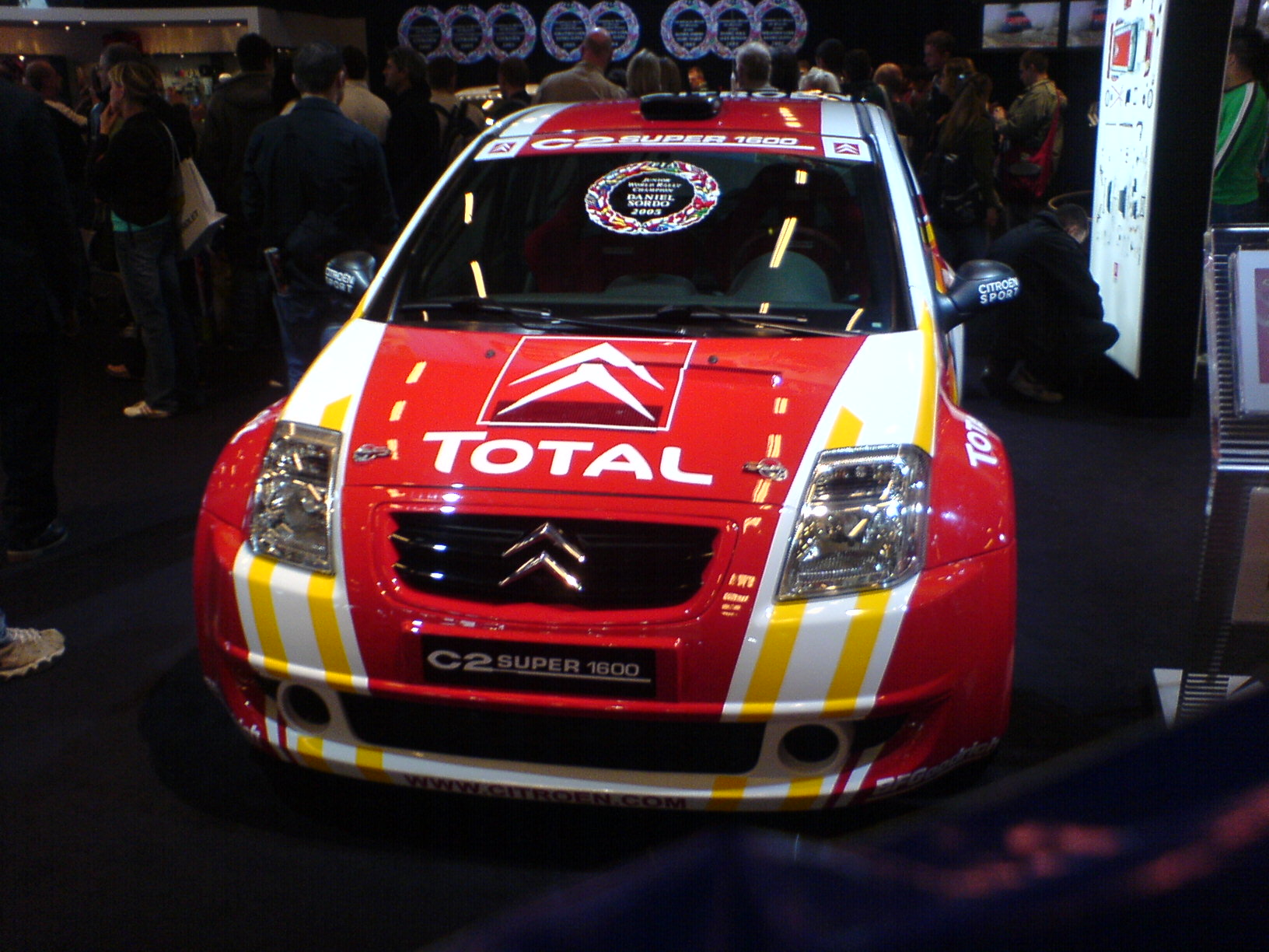 Photo de la Citroën C2 Super 1600 prise par GôTô au mondial de l'automobile de Paris 2006